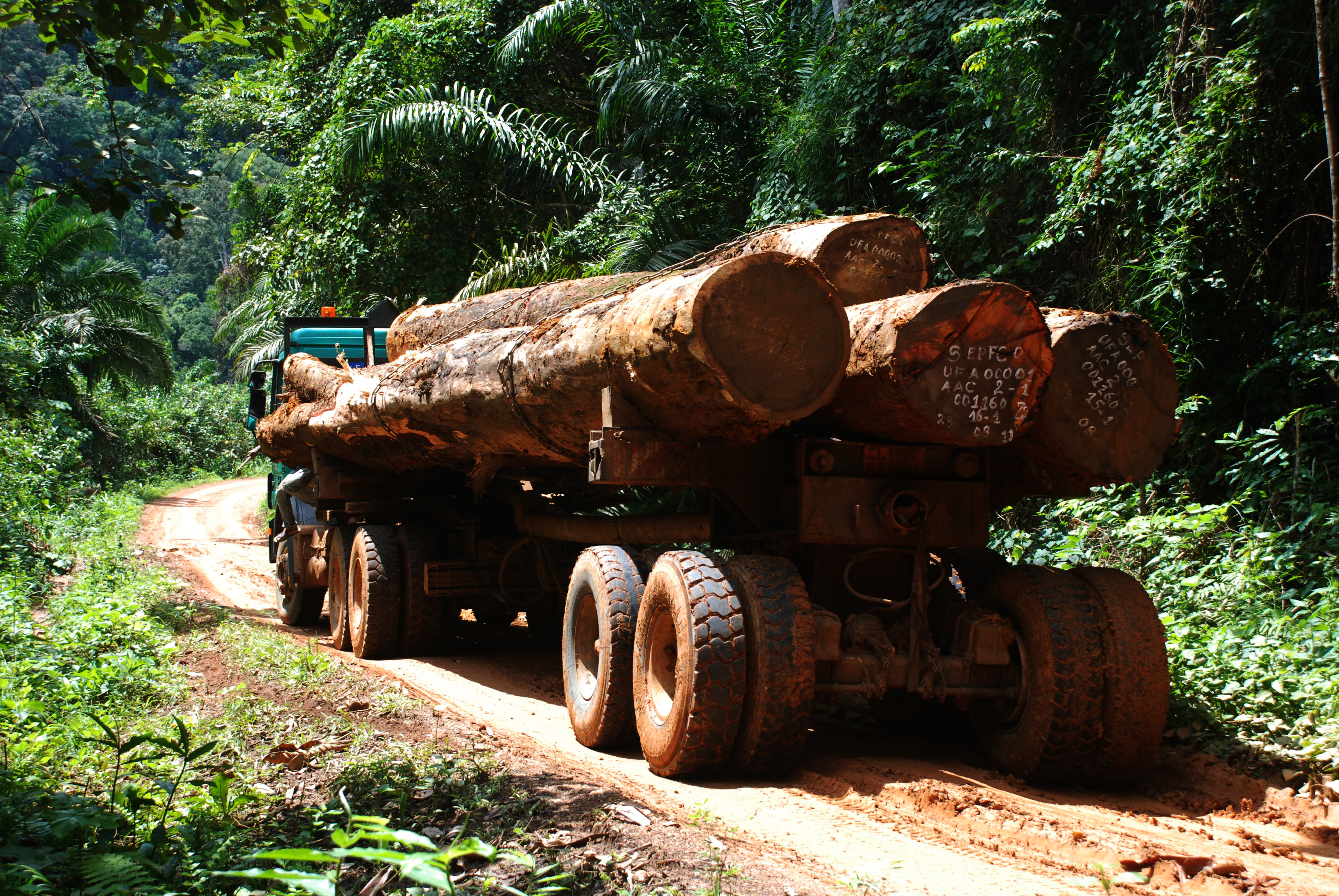 Grumier embourbée dans la forêt d'Eseka dans le Littoral pendant la saison des pluies This is an image with the theme "Africa on the Move or Transport" from: Cameroon